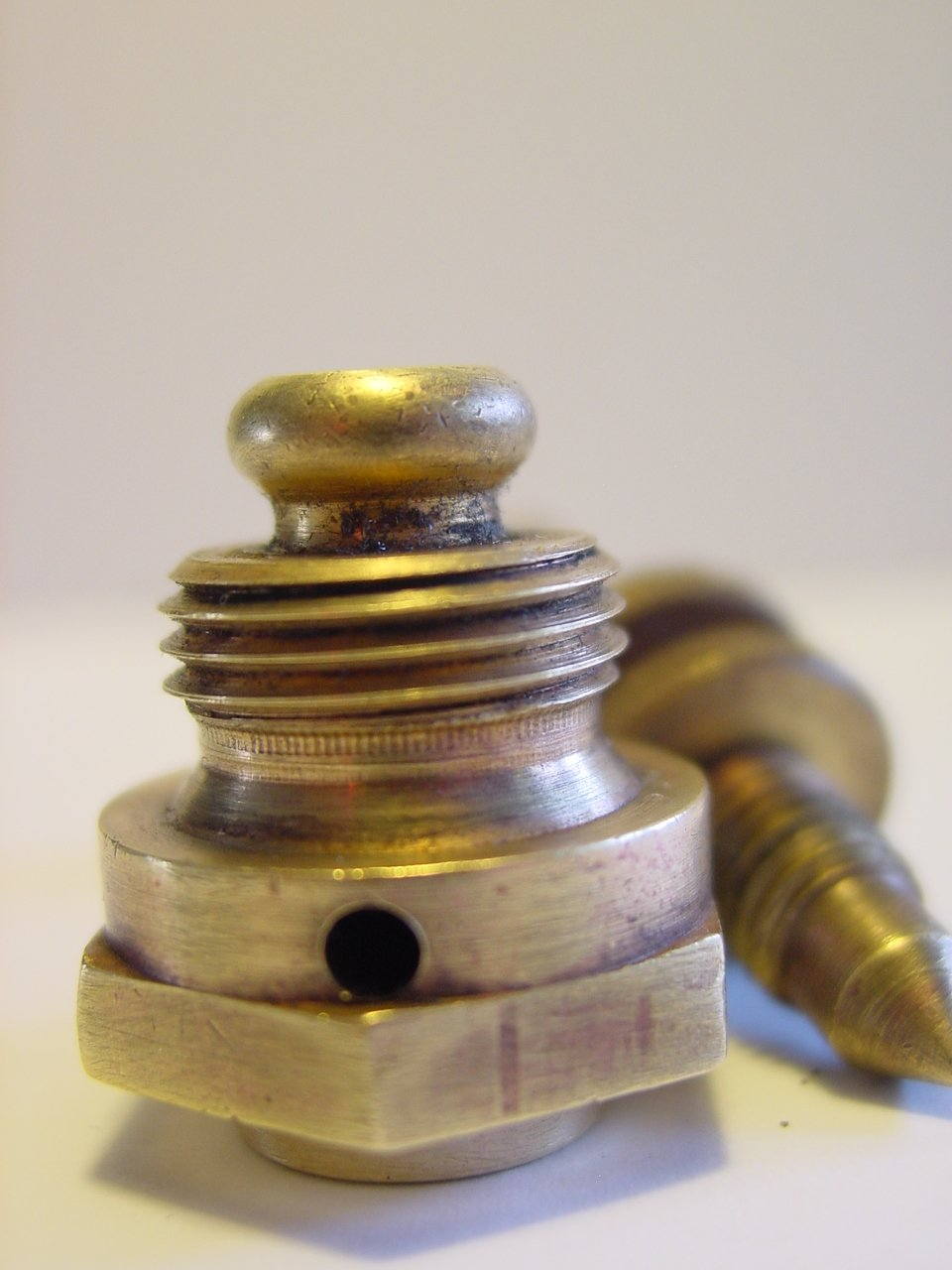 Schnüffelventil einer Kolbenpumpe Löwe Wasserknecht WL 1500